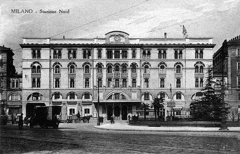 Vue du bâtiment en 1920, année où on a ajouté un étage. Il comporte maintenant 4 étages. Il sera en parti détruit par un bombardement en 1943.